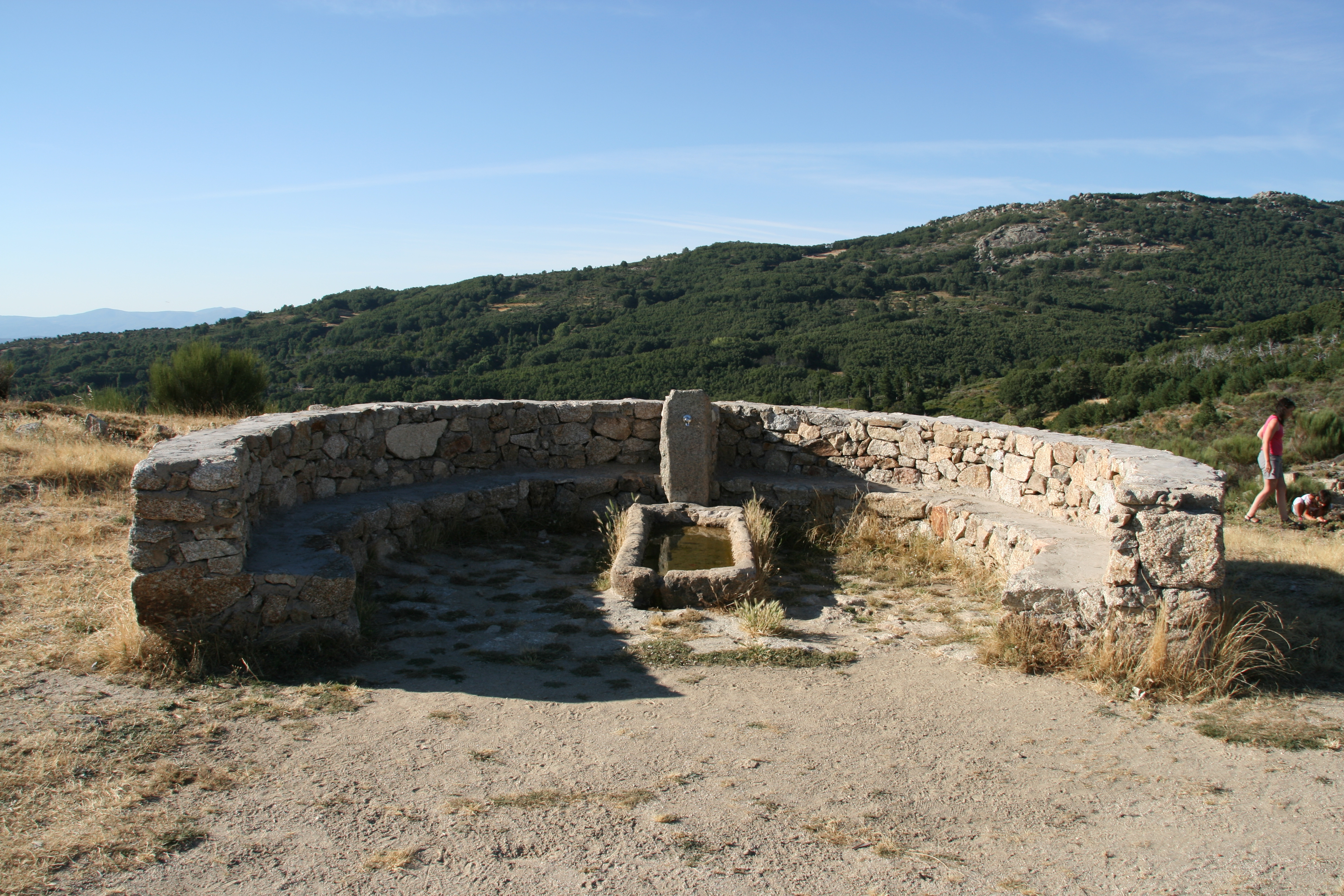 Corral de lobos junto a la carretera de Hervás a Candelario, como a unos dos kilómetros del desvío a La Garganta, en dirección a Candelario